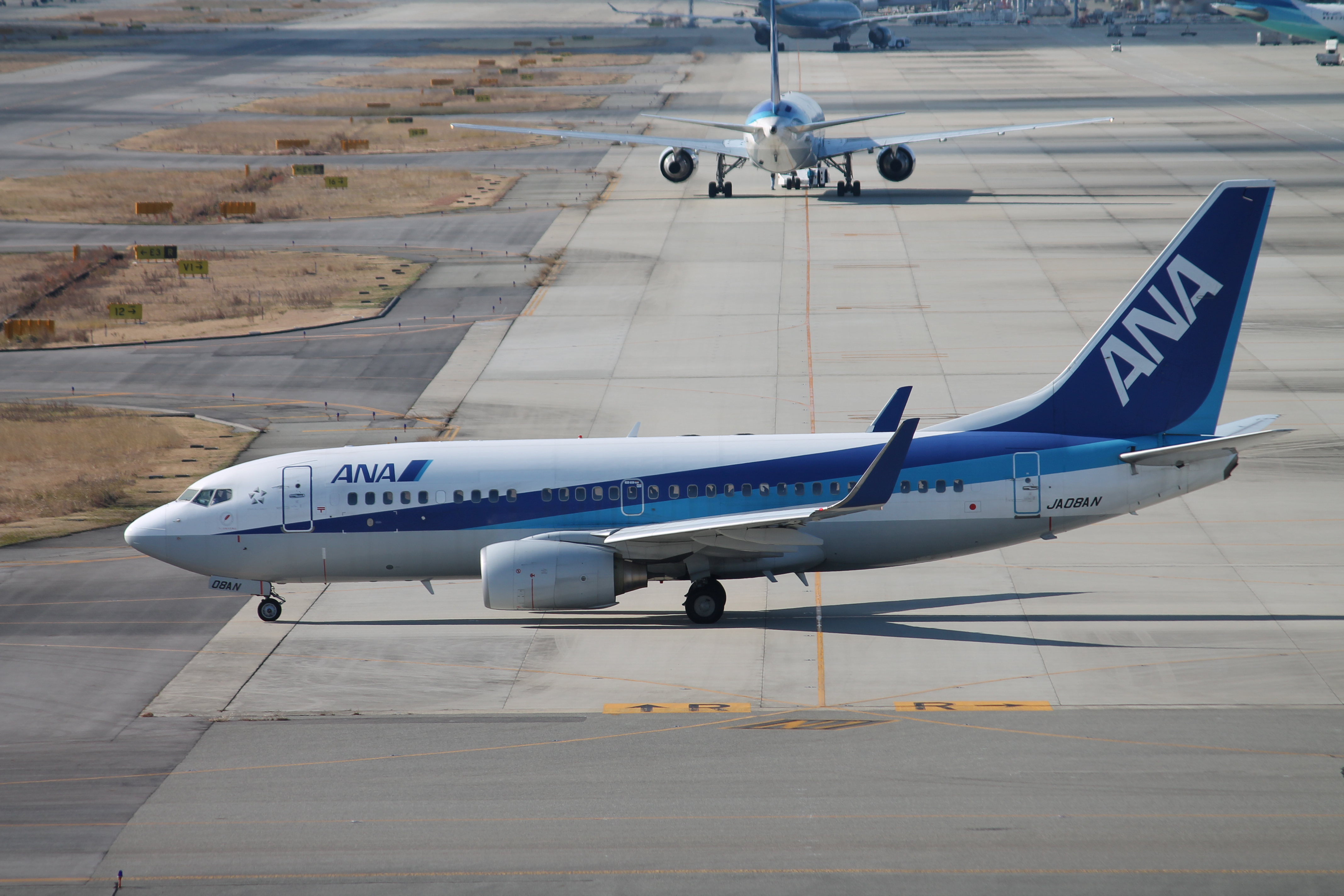 関西空港にて。2012/12/27撮影。